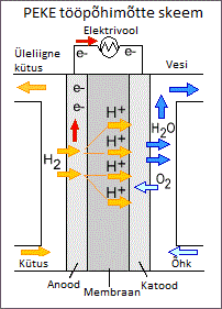 Polümeerleektrolüüt-kütuseelemendi tööpõhimõtte skeem.